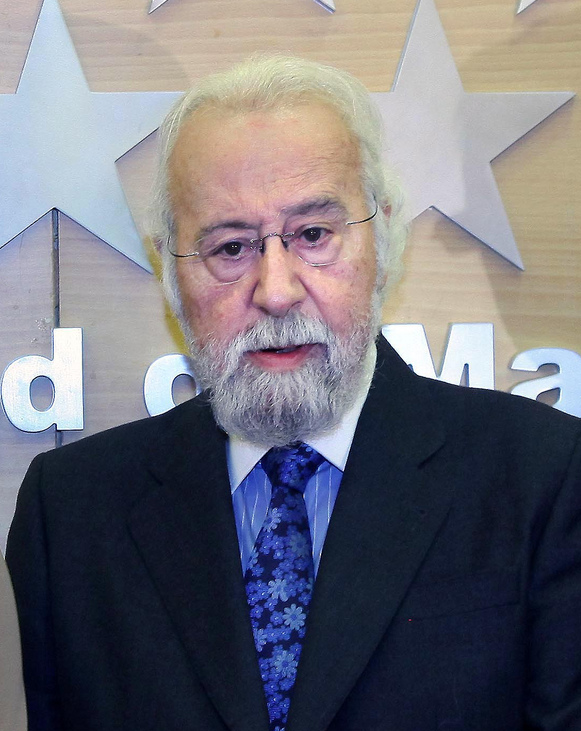 Esperanza Aguirre junto a Luis Eduardo Cortés y Joaquín Leguina en la presentación del libro “Congostium”, escrito por Luis Eduardo Cortes, presentado en la Real Casa de Correos